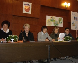 Anđelka Pavić, prevoditeljica i pjesnikinja iz Belog Manastira; snimljeno na promociji njene knjige Ljubav je riječ